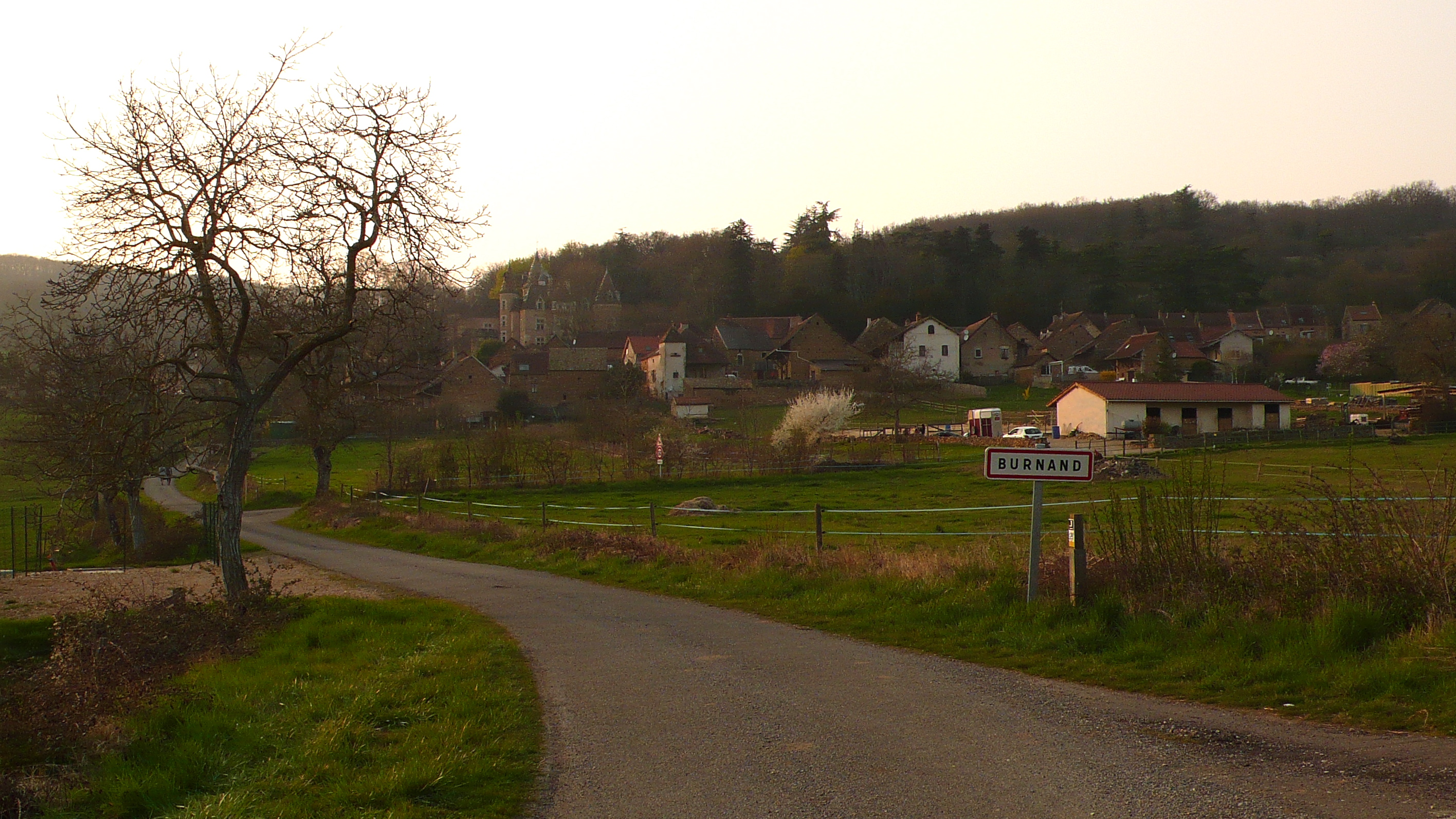 Village de Burnand, Avril 2009